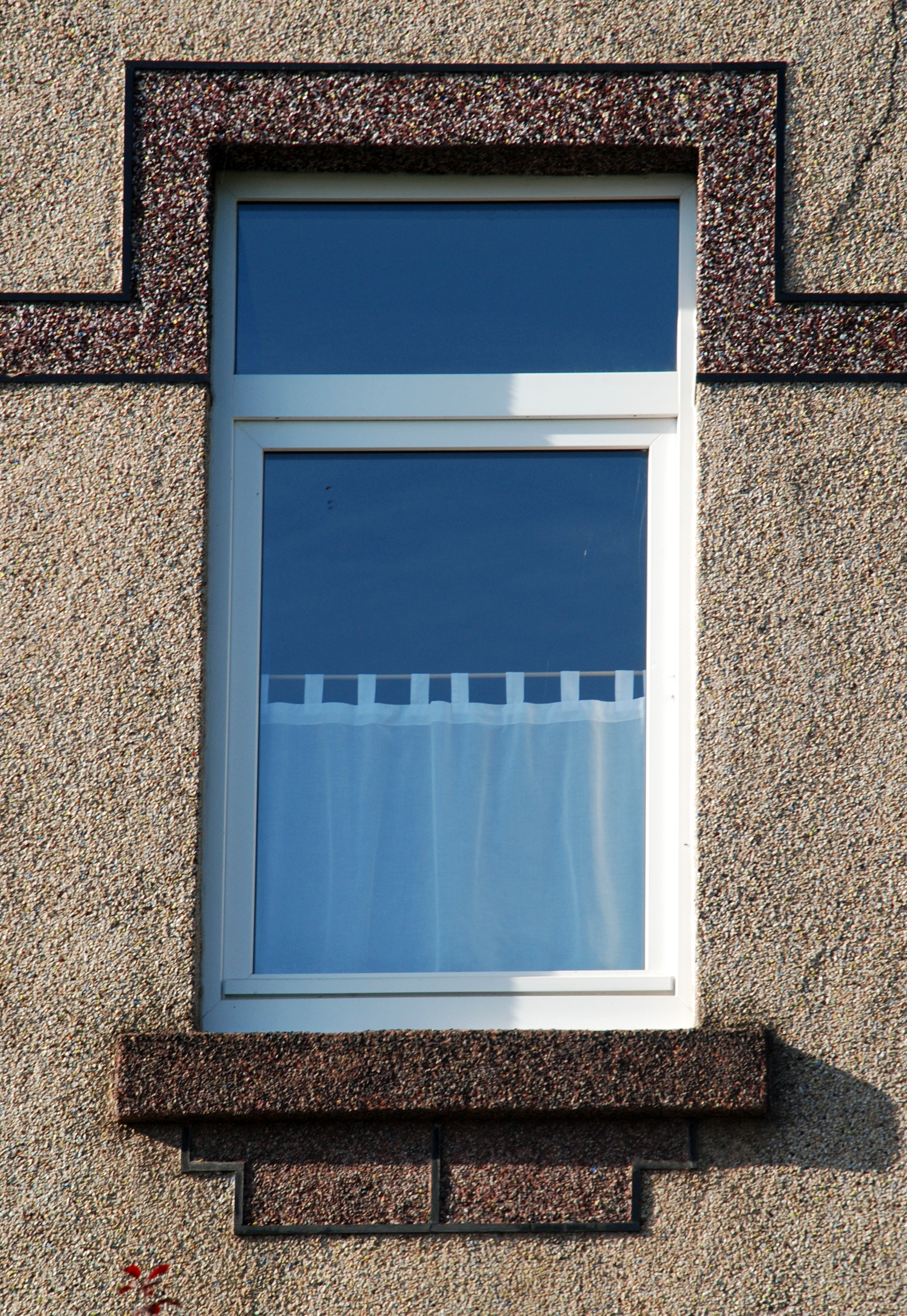 Belgique - Ottignies - façade en cimorné - Art déco